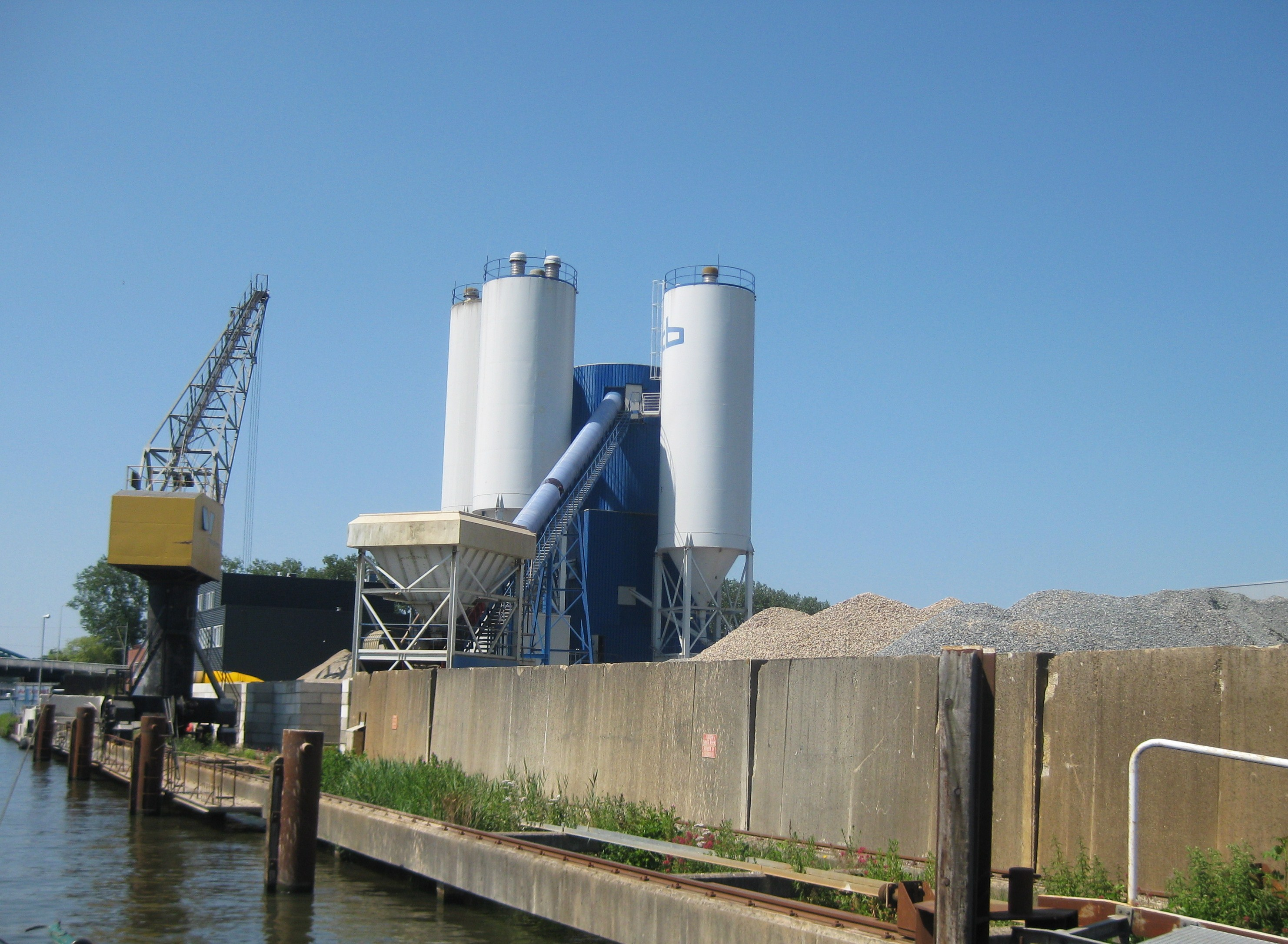 Betonmortel bedrijven Cementbouw in Diemen